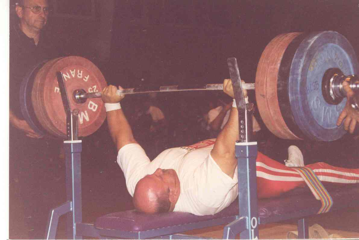 Ryszard Tomaszewski Mistrzostwa Europy- Budapeszt 1999r.